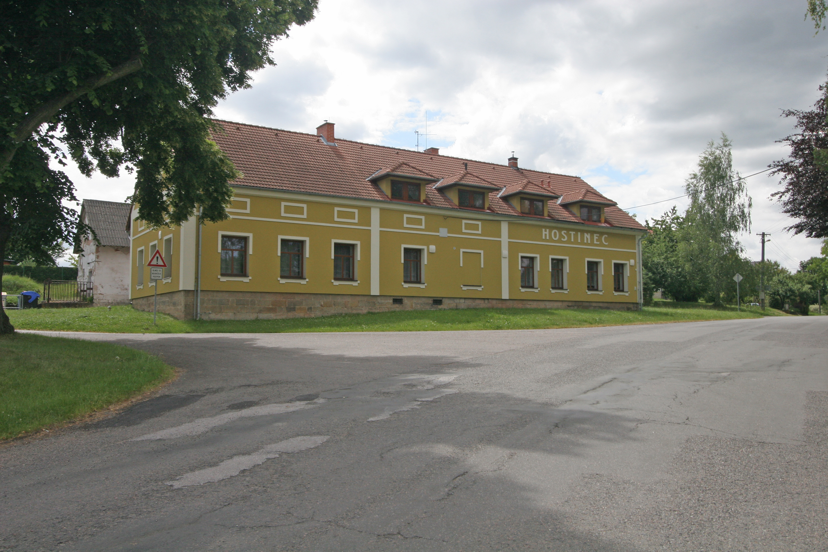 Vilantice obecní hospoda